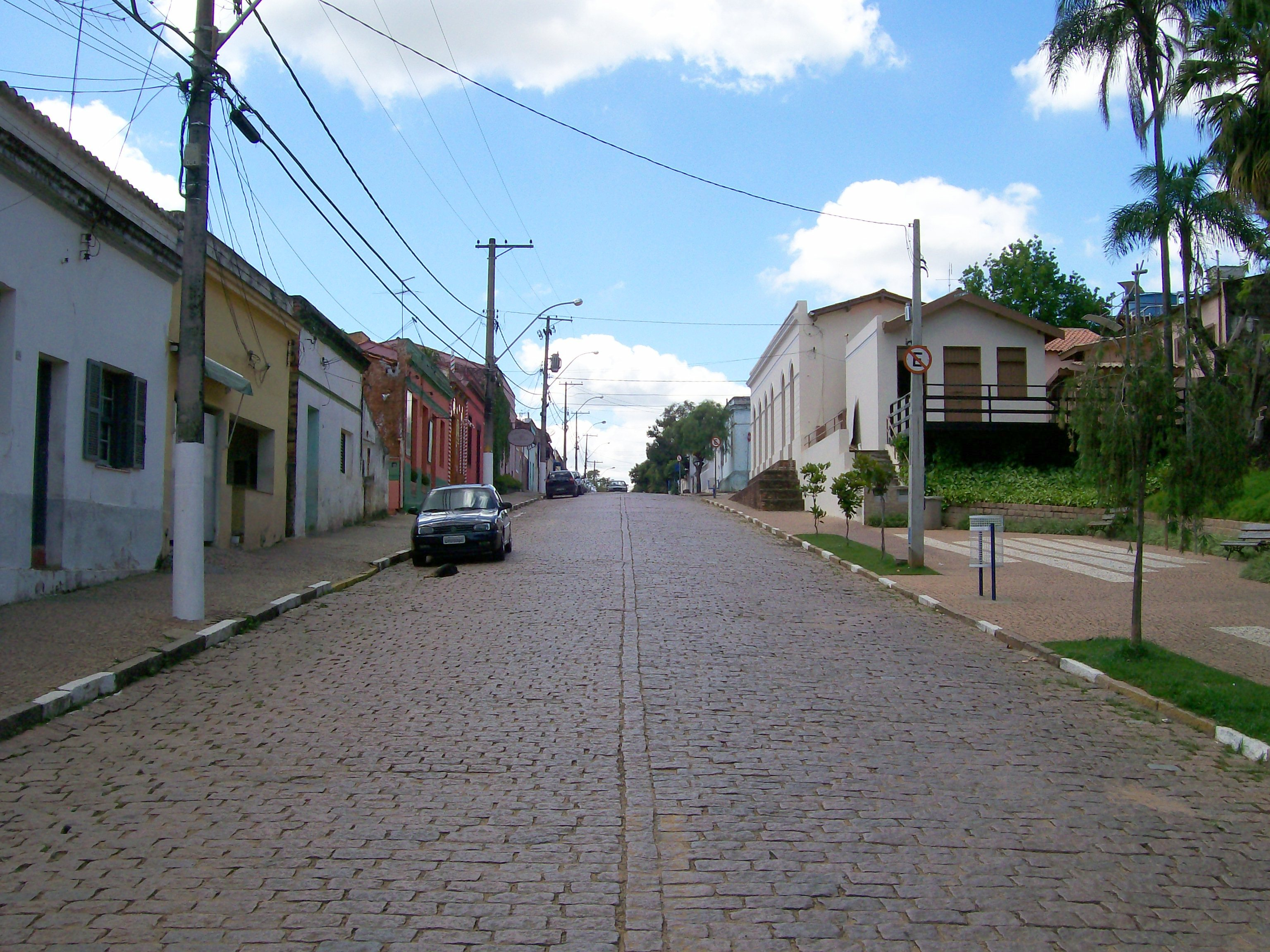 Rua Heitor Penteado, a principal do distrito campineiro de Joaquim Egídio.